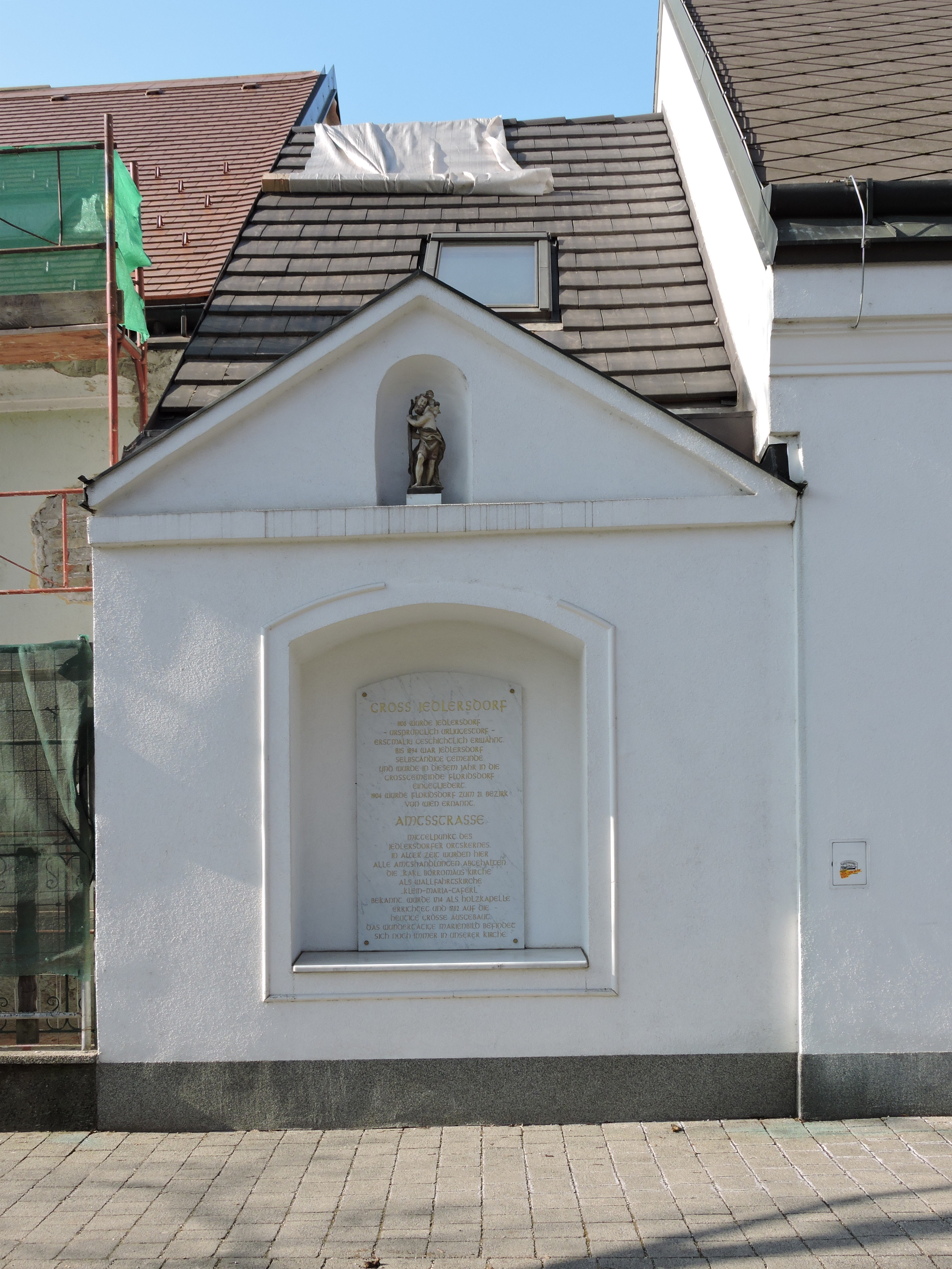 Breitpfeiler